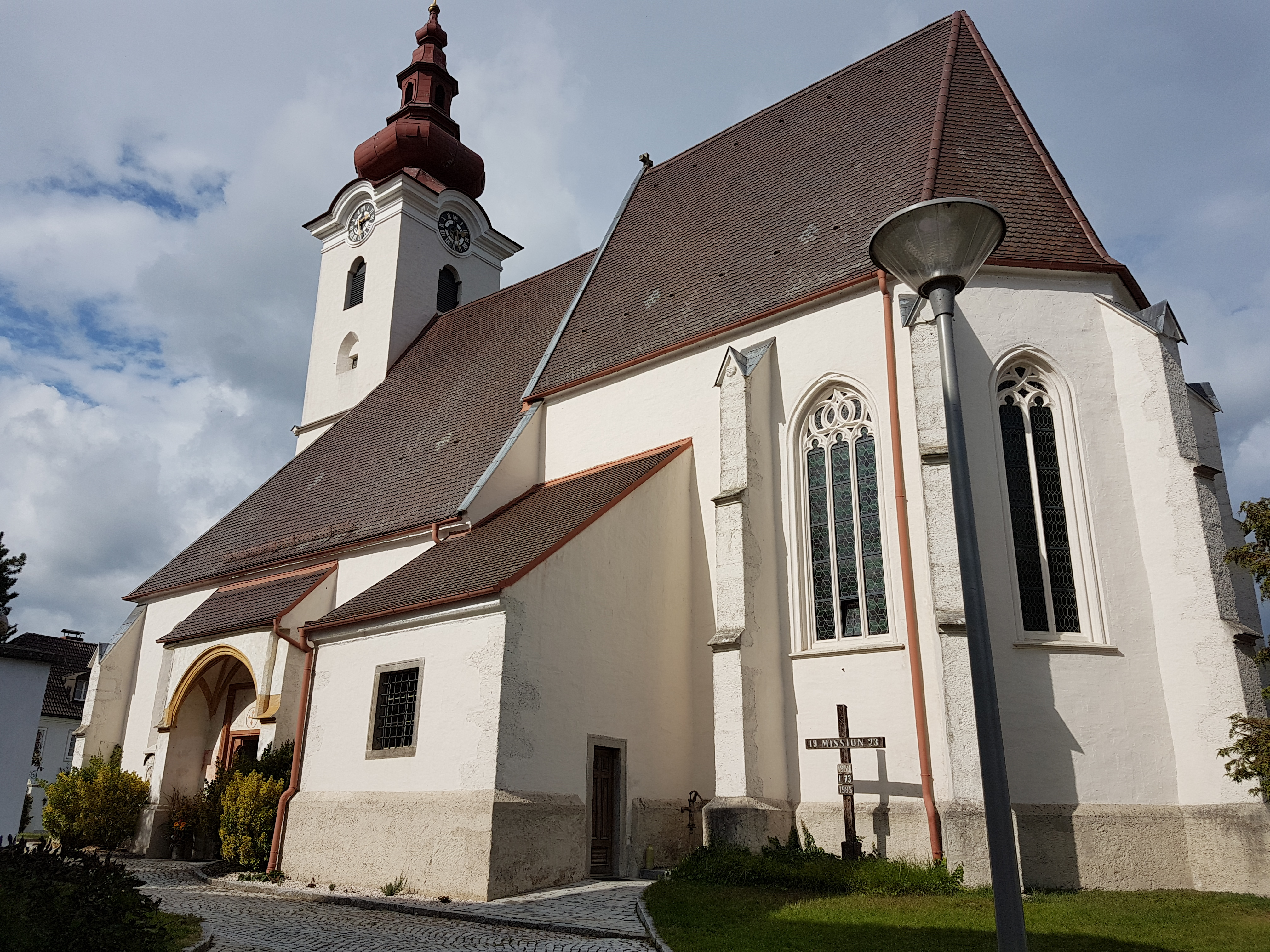 Gotische Kirche des heiligen Pantaleons in St.Pantaleon-Erla